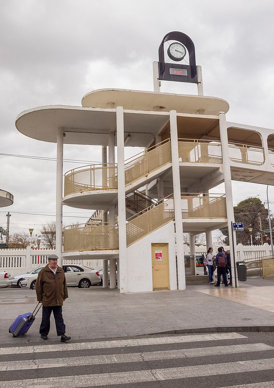 Estación de tren de cercanías de Alcalá de Henares.